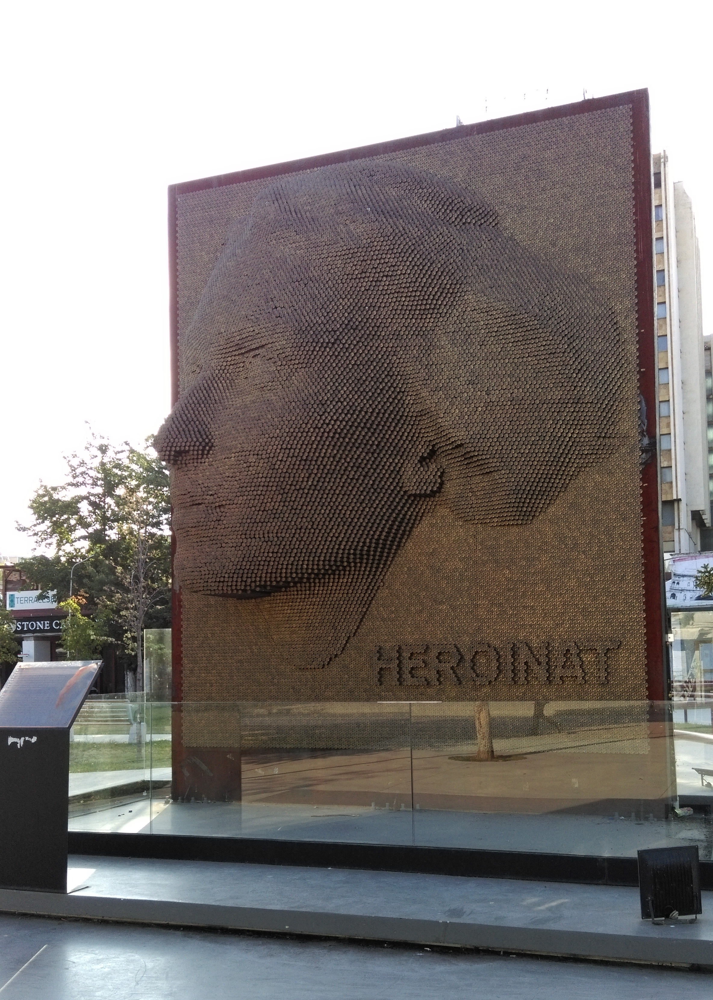 Monumenti Heroinat në Prishtinë